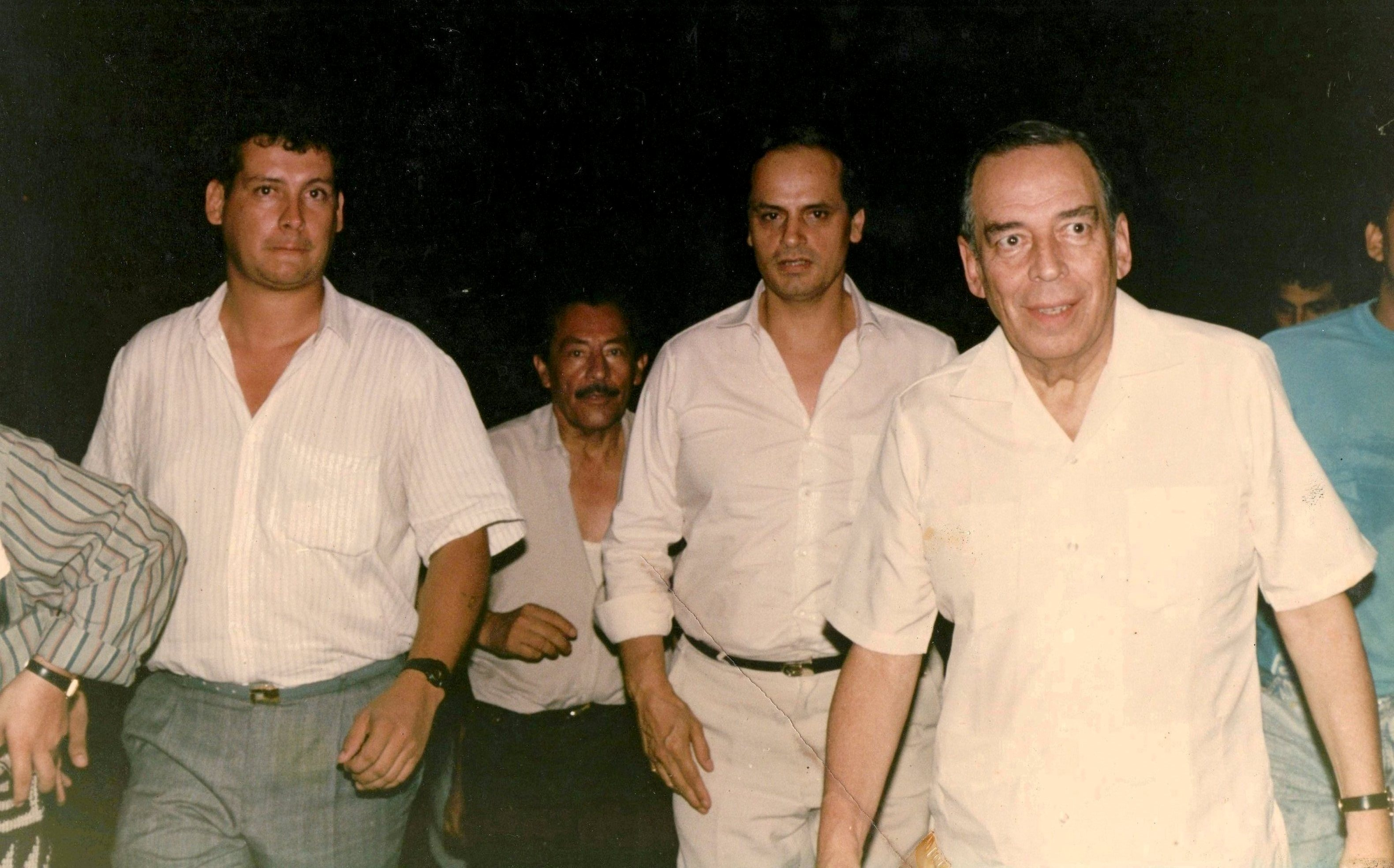 Álvaro Gómez Hurtado (1919-1995), dirigente conservador y candidato a la Presidencia de Colombia en una gira política.